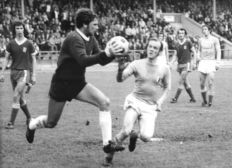 ADN-ZB-Thieme 24.5.75 Karl-Marx-Stadt: Fußballoberliga Wismut-Aue gegen FC Rot-Weiß Erfurt 2:1-Hier kann der Schlußmann der Erfurter, Torhüter Reßler, einen Angriff von Spieler Stein (Wismut-Aue) noch klären. Im Verlauf des Spiels mußte er doch zwei Treffer hinnehmen.